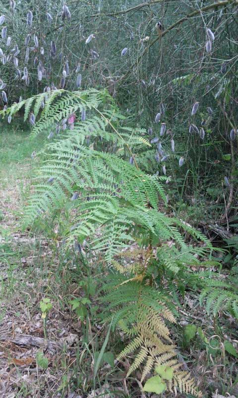 O Reboledo (Ourense)